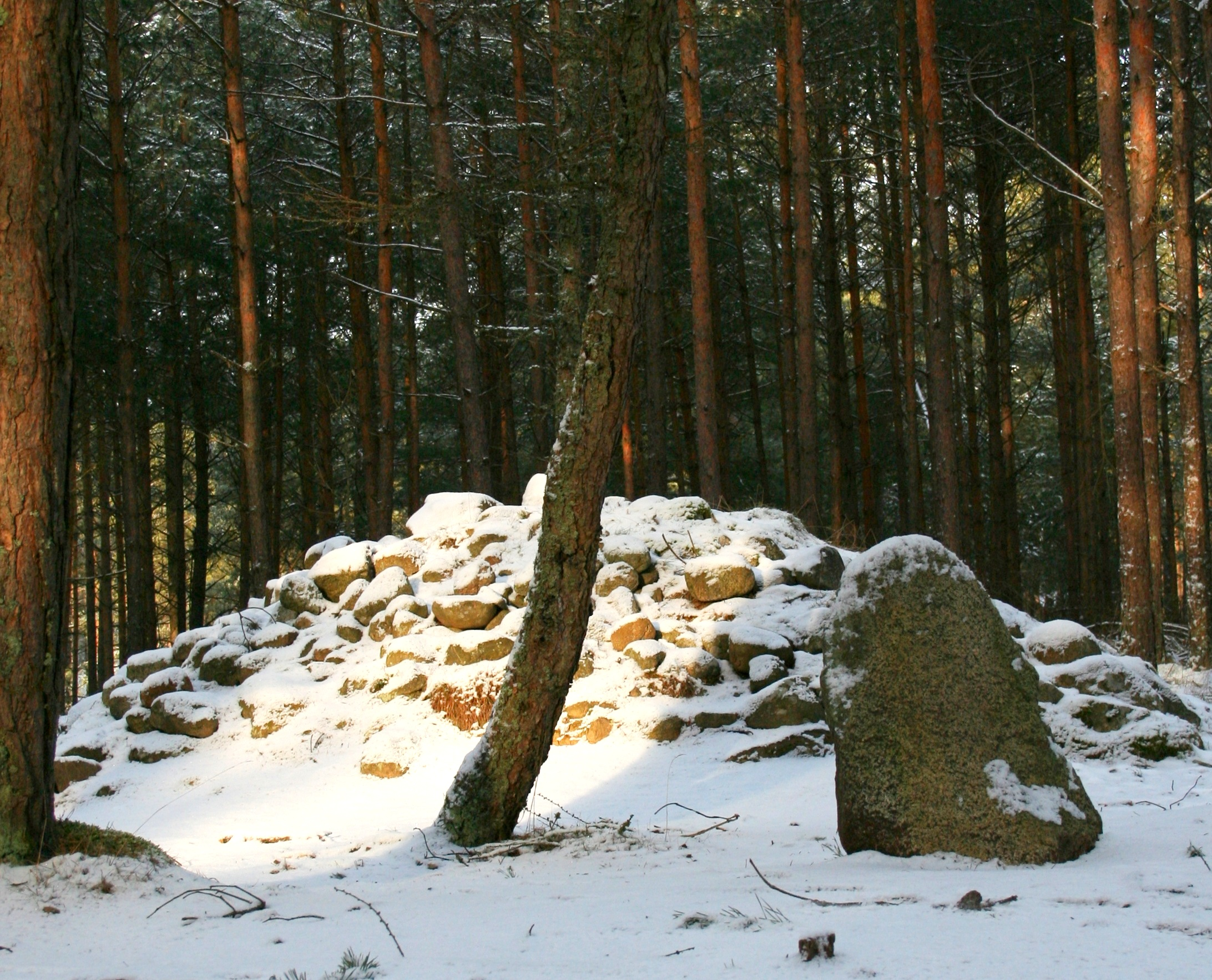 Węsiory - kurhan pokryty kamieniami.